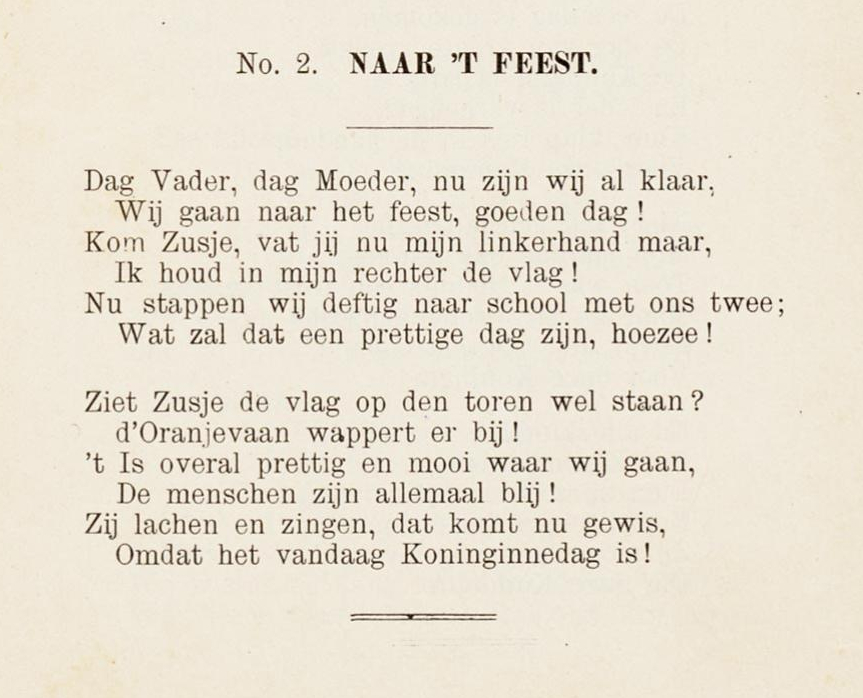 Liedblad met een liedtekst van Hendrik Bruining (1850-1925). Lied over verjaardag van koningin Wilhelmina in 1898.